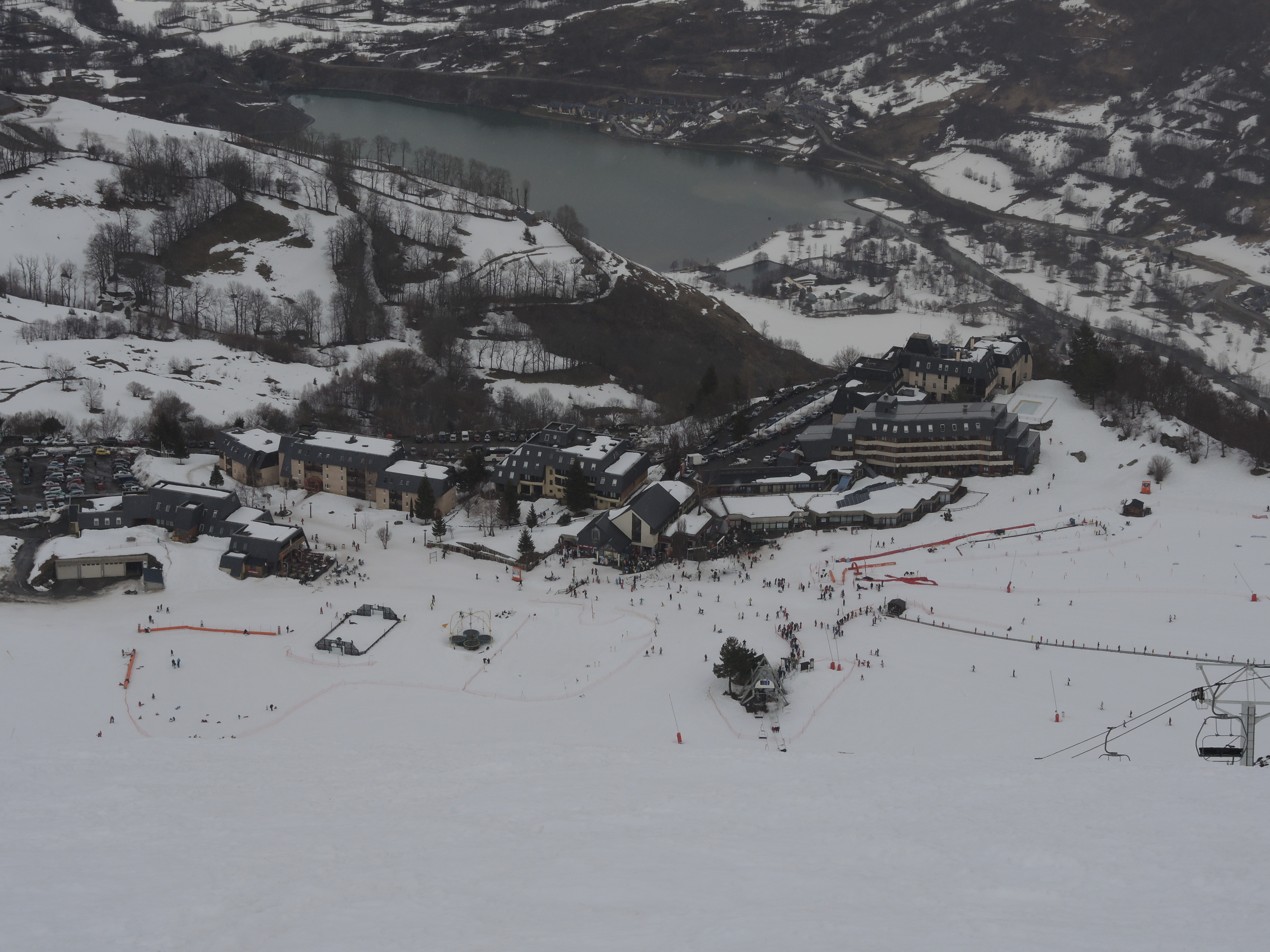 Détails sur les logements collectifs de la station de ski de Val-Louron.